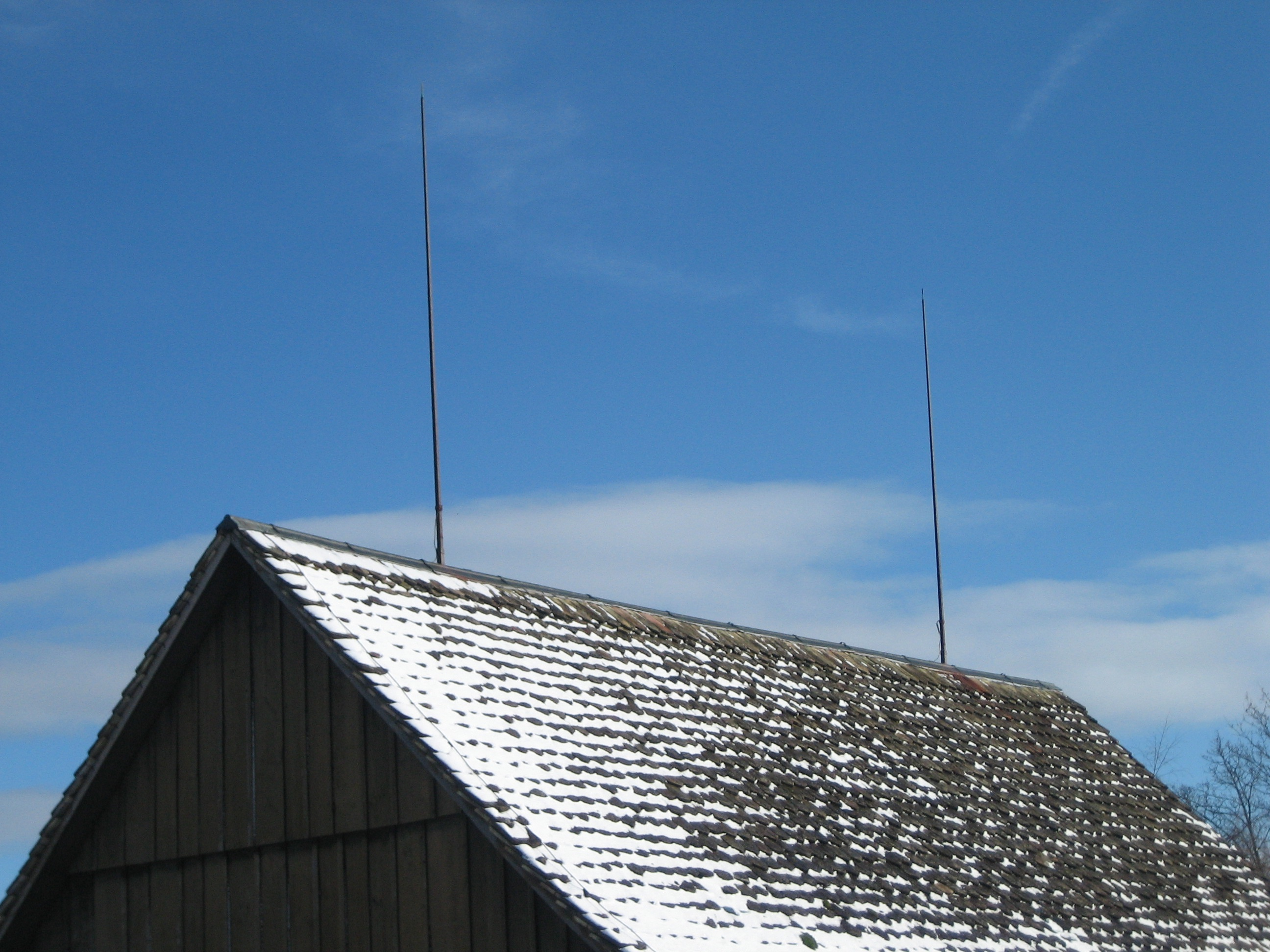 Blitzableiter auf einer Scheune